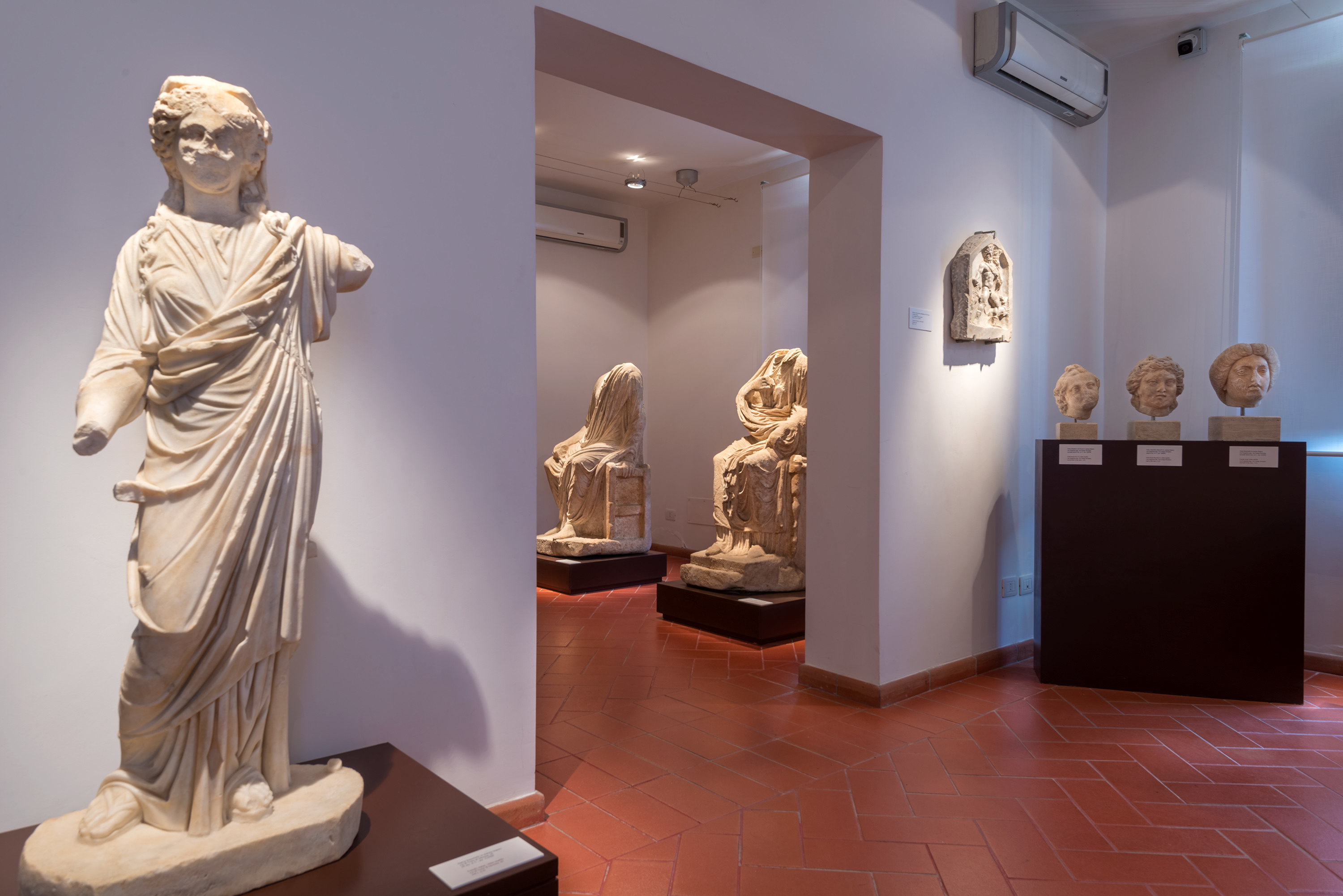 Statuaria all'interno dell'Antiquarium